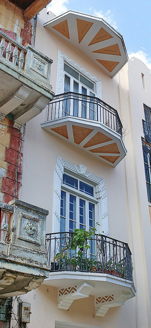 Casa Art Deco, Casco Antiguo Panama